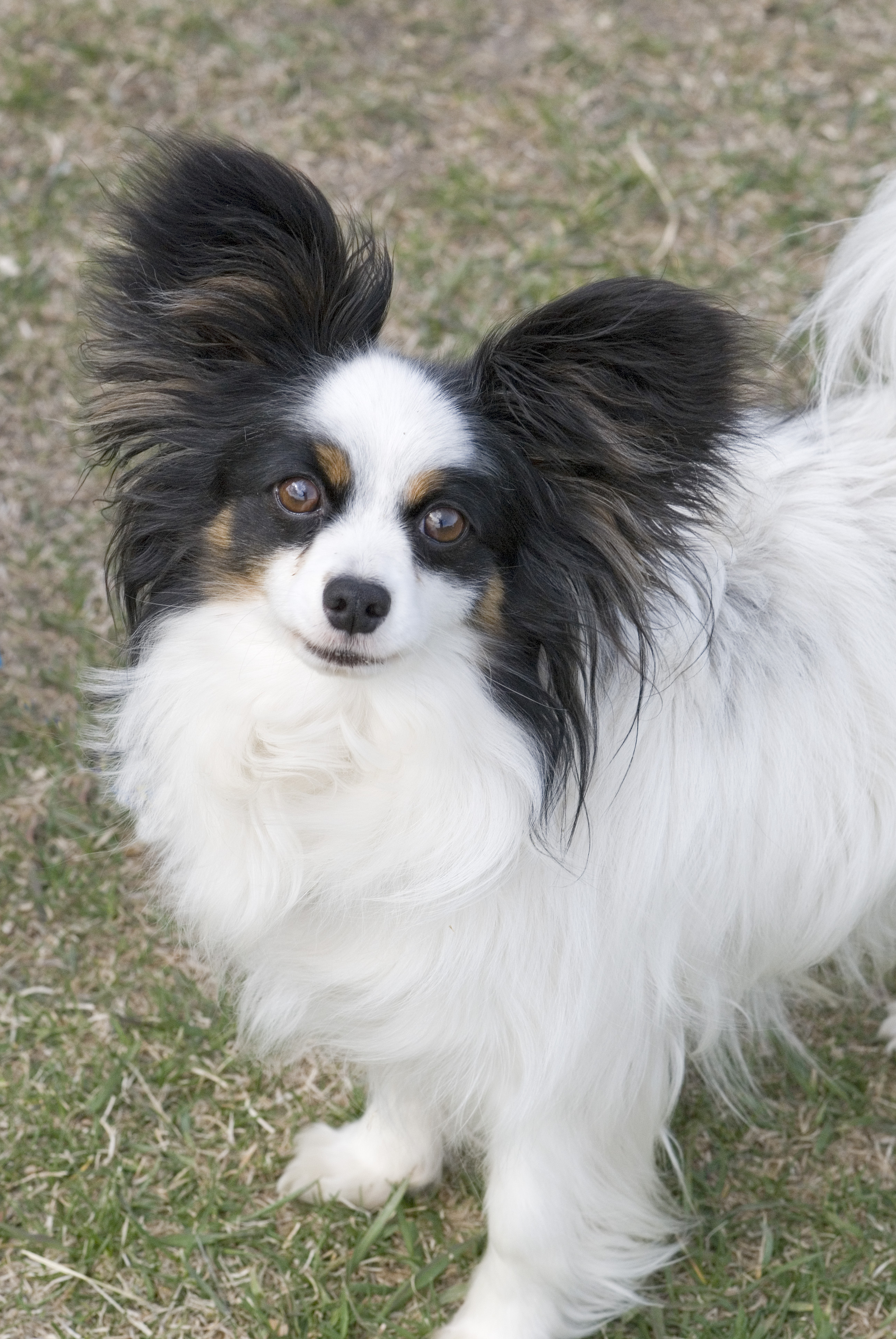 A Papillon dog.